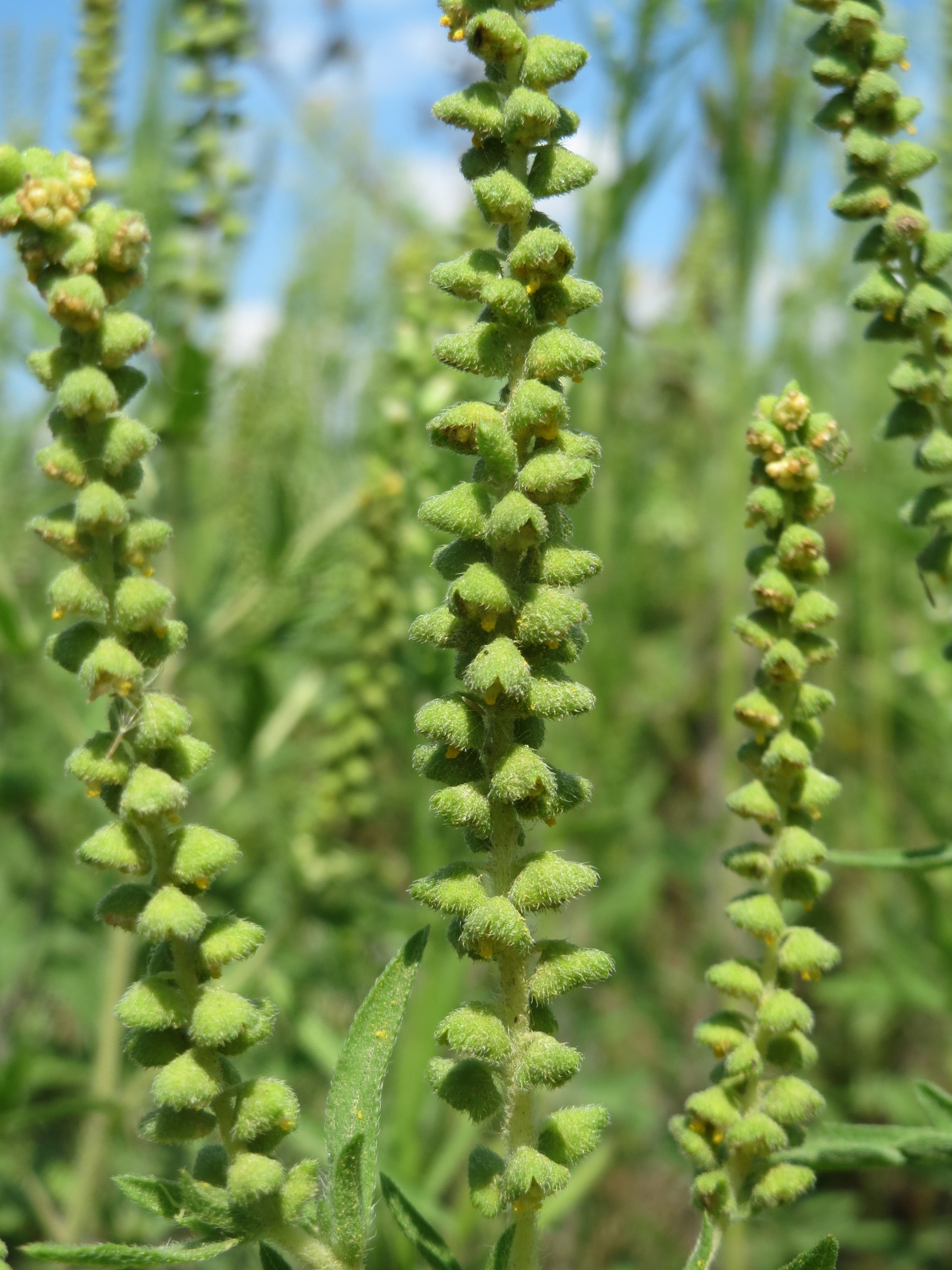 Ambrosia psilostachya auf einer Ruderalfläche in Hockenheim-Talhaus